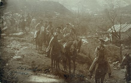 Офицери от щаба на Трета пехотна балканска дивизия по време на зимно учение.